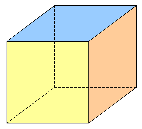 ruimtelijk figuur - eigen werk ism danielm - publiek domein